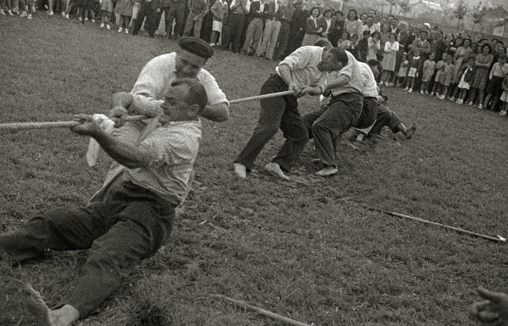 Título original: Inauguración del campo de fútbol de Lasarte (5/8) Localización: Lasarte-Oria (Guipúzcoa)